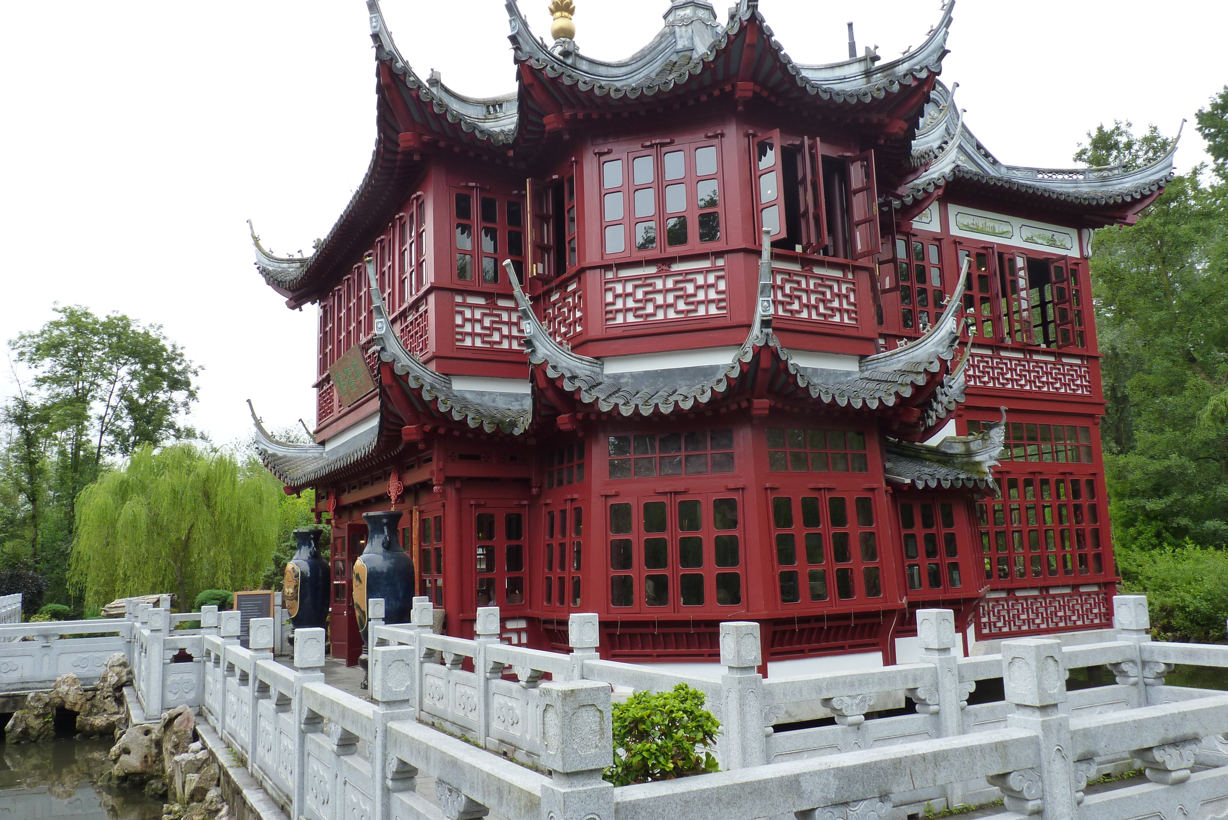 Пайри Дайза, зоопарк в Бельгии, чайный домик